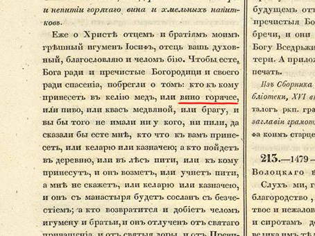 1479–1515. Наказная грамота св. Iосифа Волоцкаго соборнымъ и прочимъ братiямъ, о недержанiи в монастырѣ и непитiи горячаго вина и хмельныхъ напитковъ // Дополненiя къ Актамъ историческимъ, собранныя и изданныя Археографическою Комиссiею. Т. I. Санктпетербургъ: Типографiя II Отдѣленiя Собственной Е. И. В. Канцелярiи, 1846. С. 360.